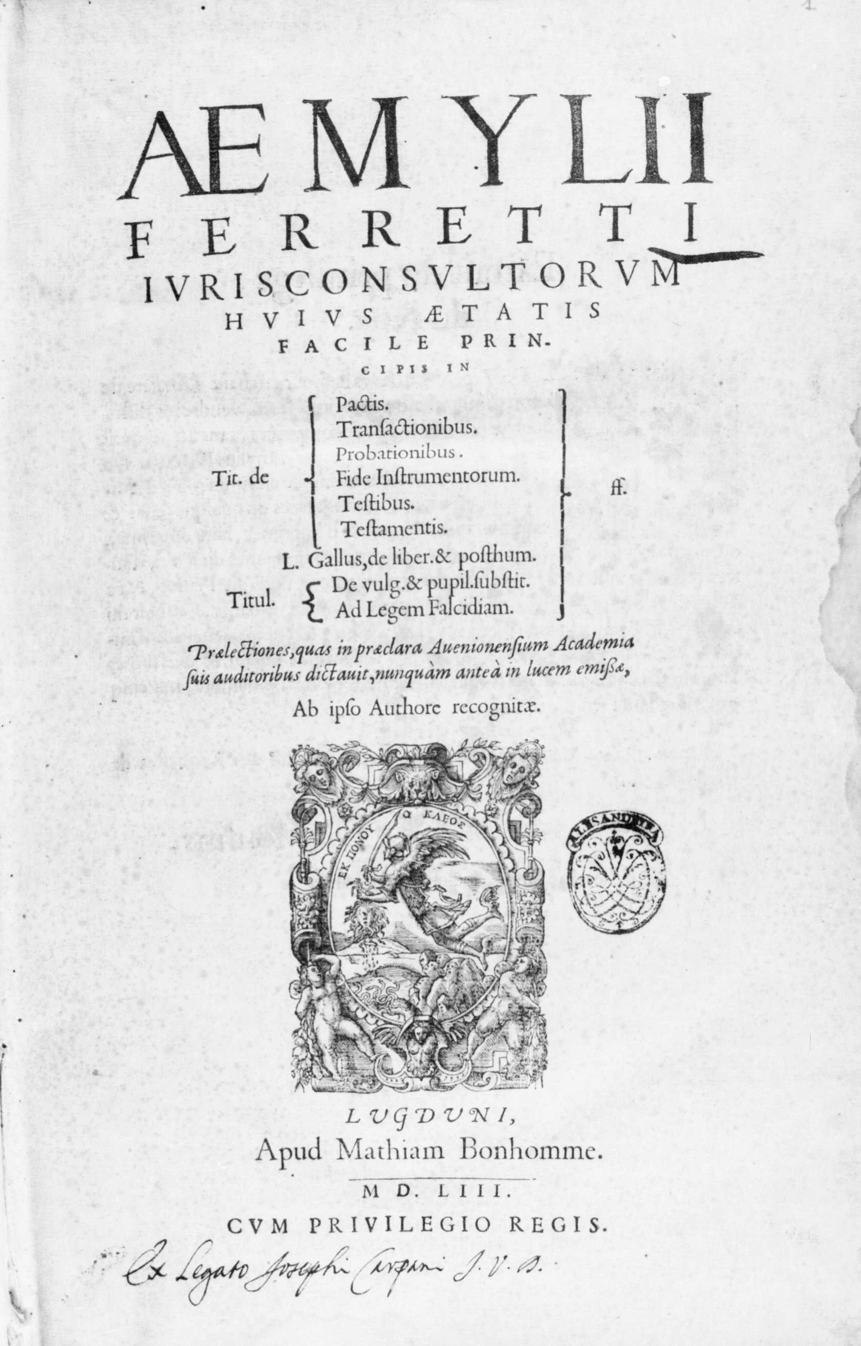 Frontespizio